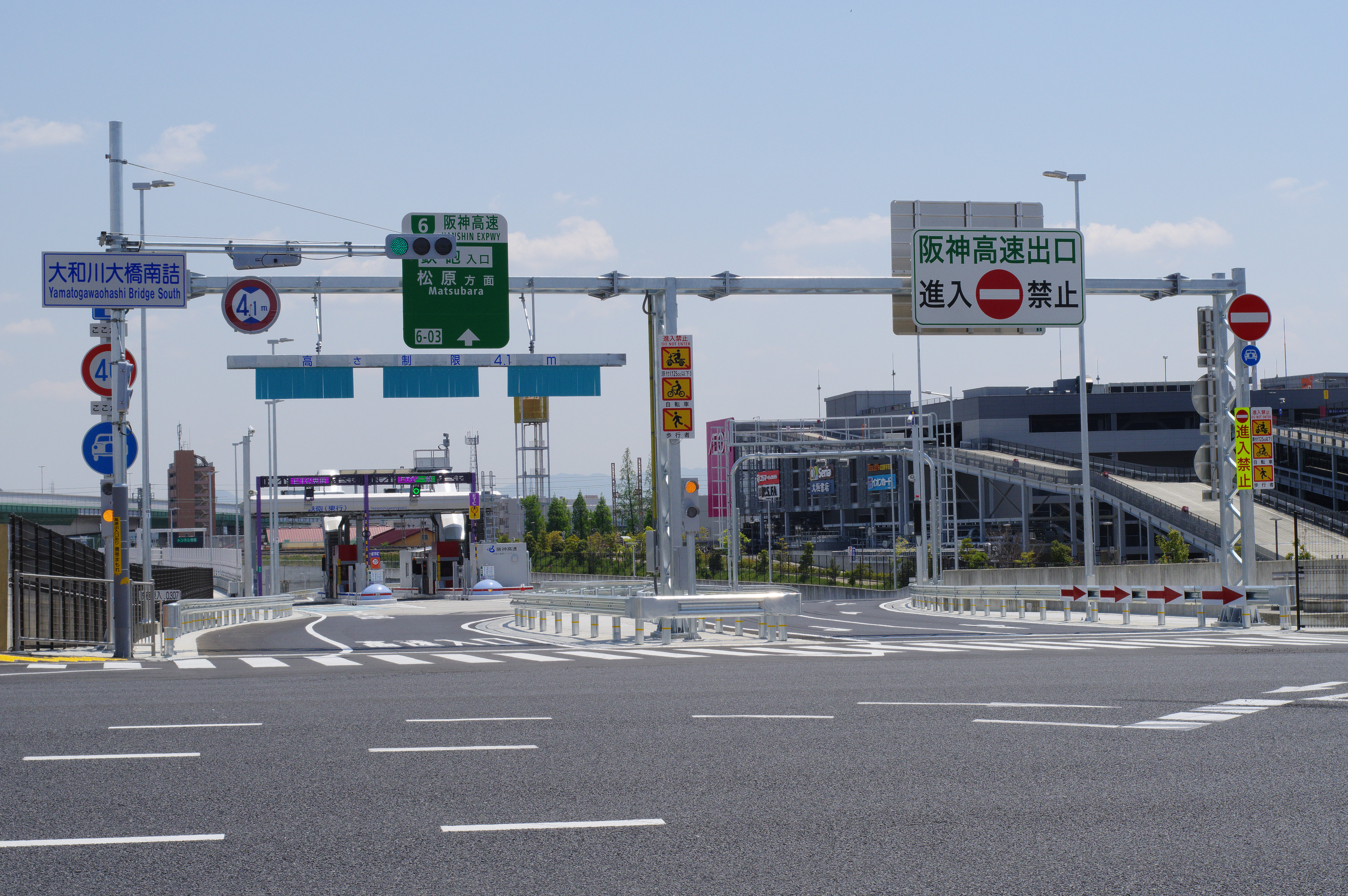 阪神高速6号大和川線 鉄砲出入口 東側 国道26号 大阪府堺市堺区鉄砲町